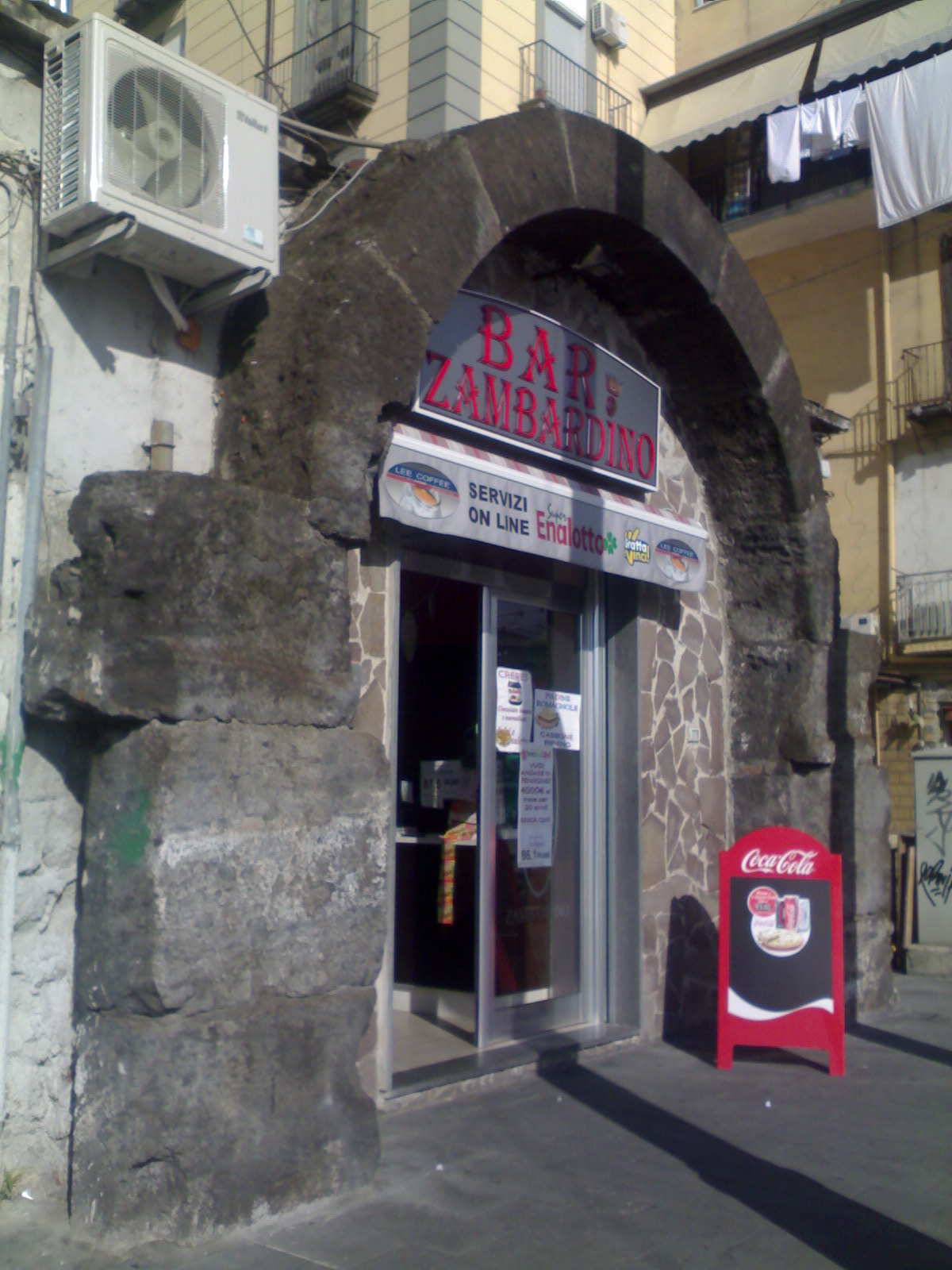 Porta dei Tornieri in via Marina